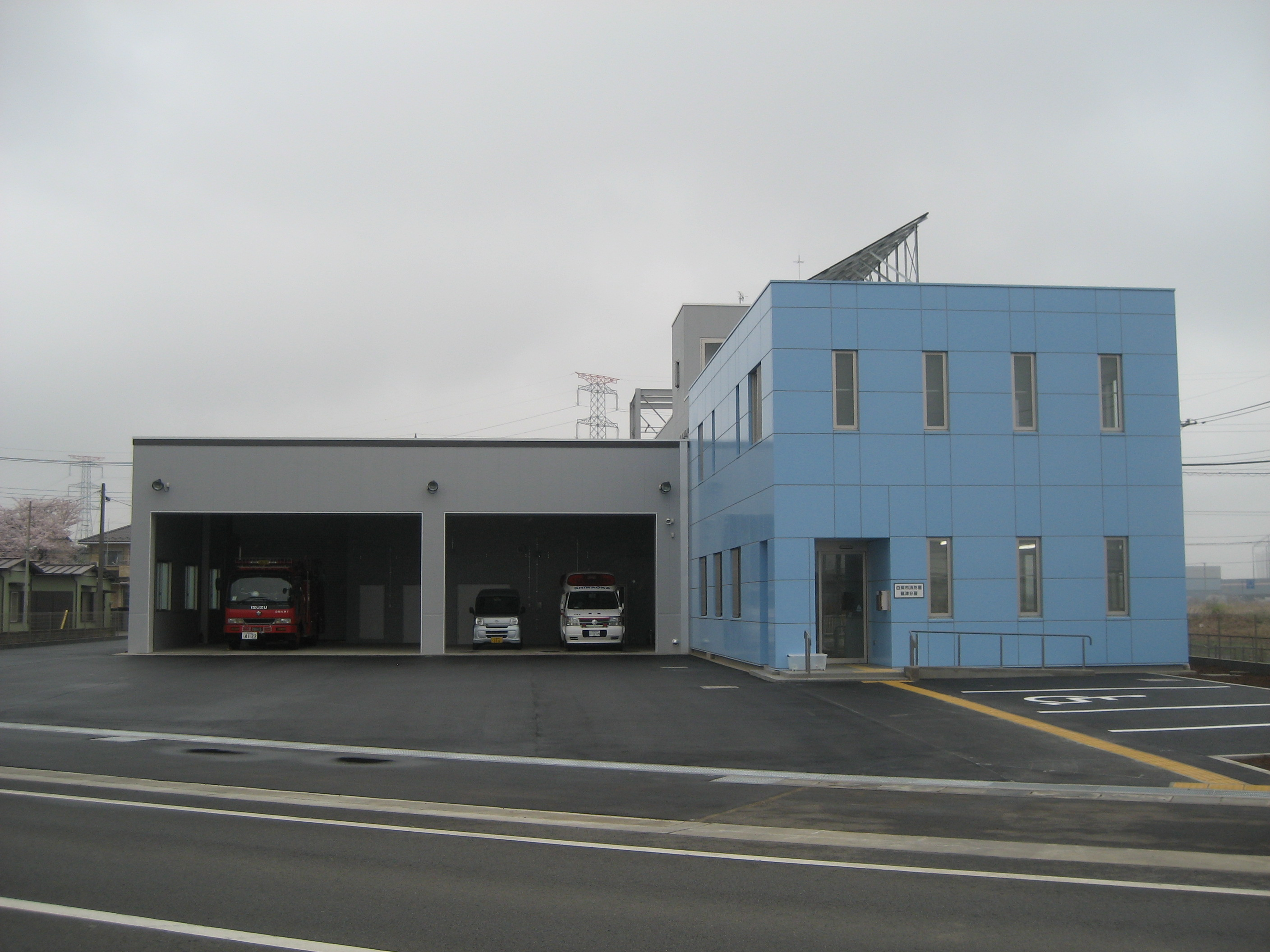 白岡市消防本部篠津分署庁舎